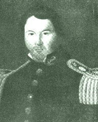 Coronel Francisco Fourmantin (1799-1861)